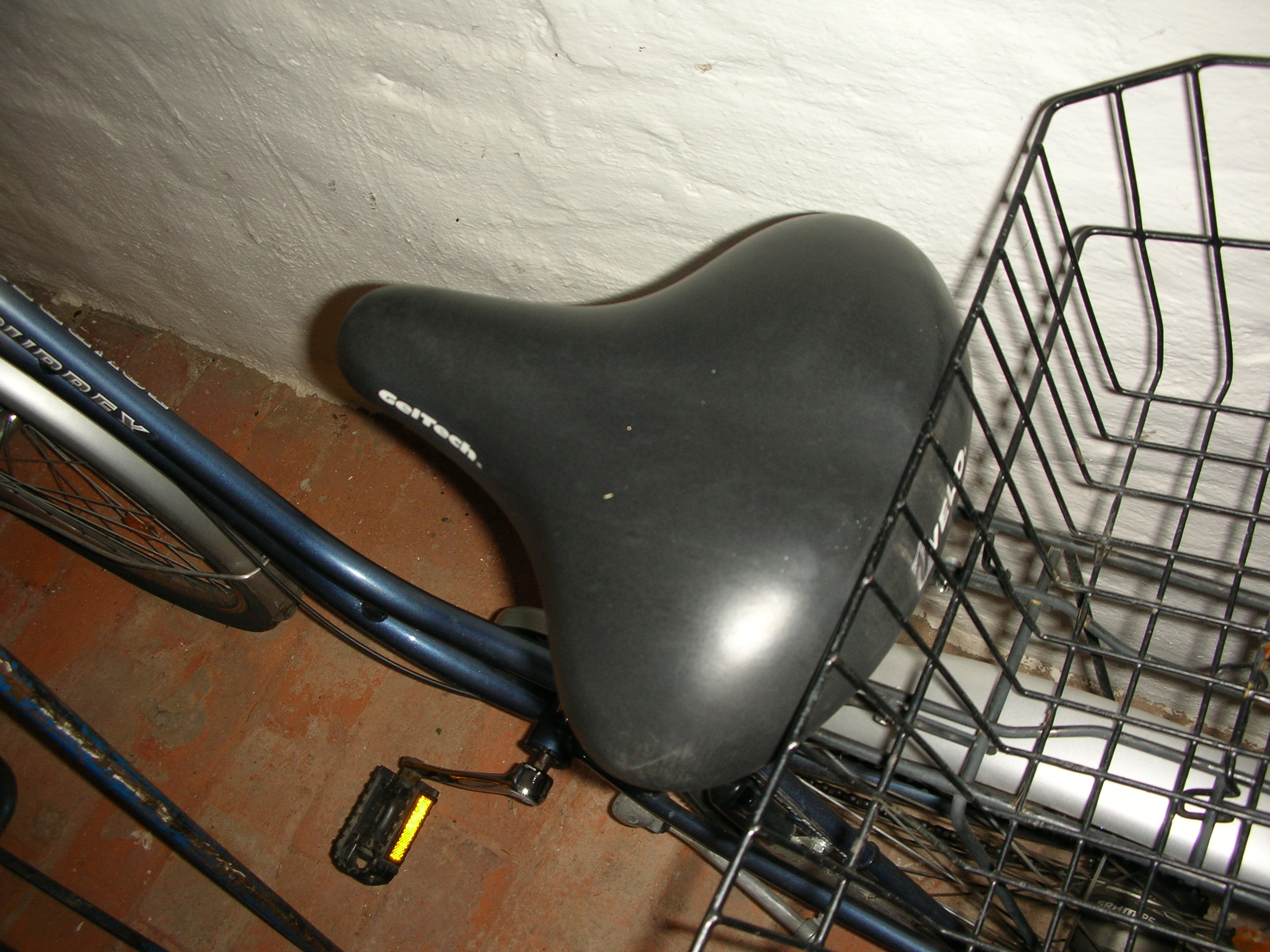 Damenfahradsattel, charakterisiert durch größere Breite und kürzere Nase